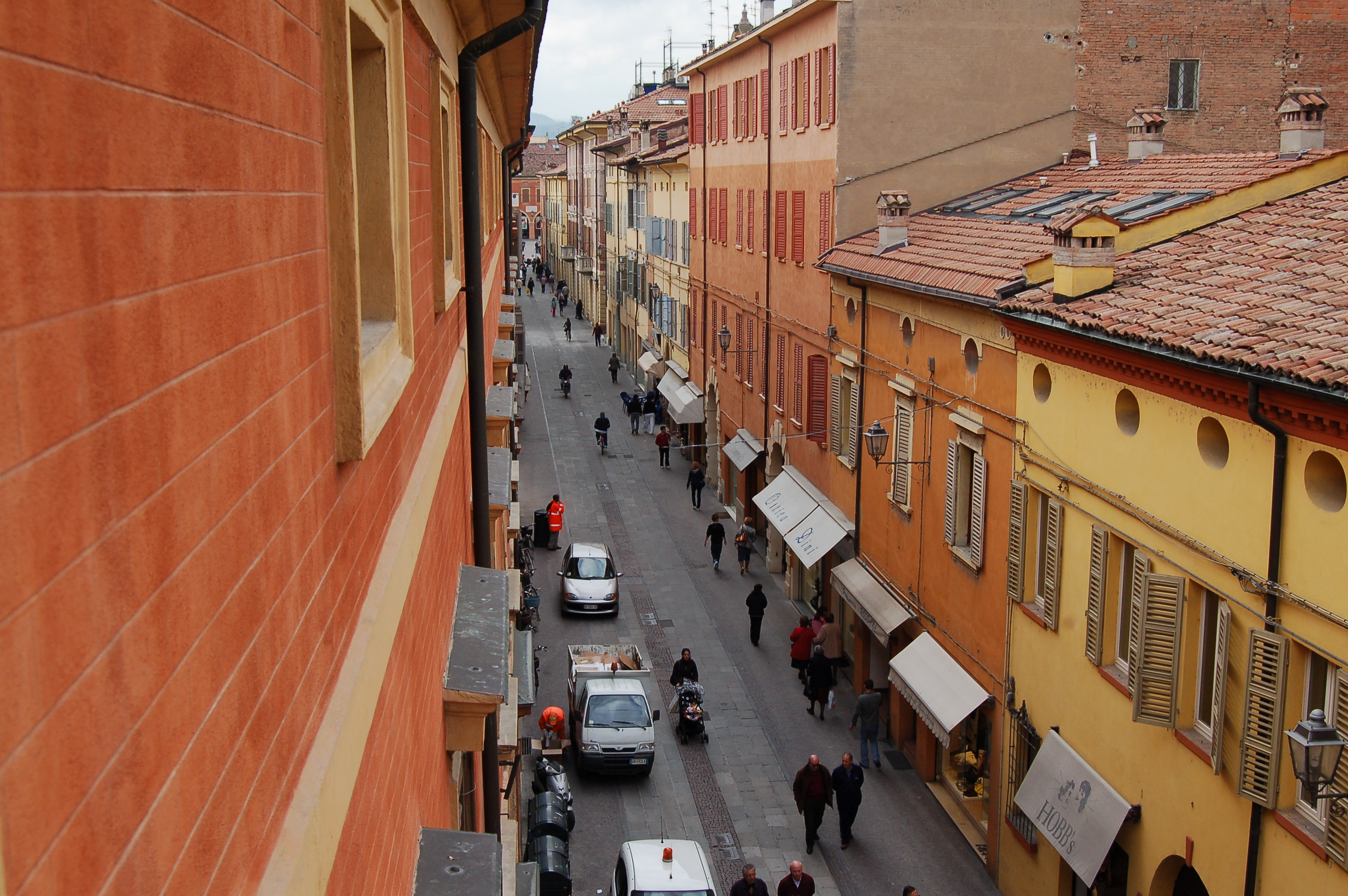 Via Ciro Menotti vista dall'Ospedale Vecchio